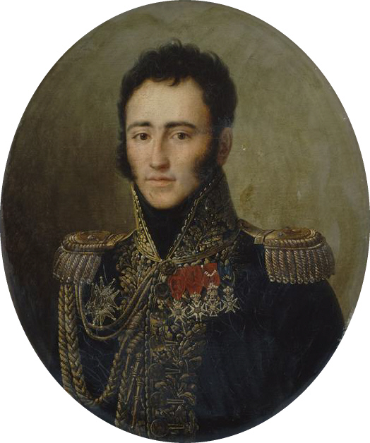 Edmond de Talleyrand-Périgord (1787-1872), French General